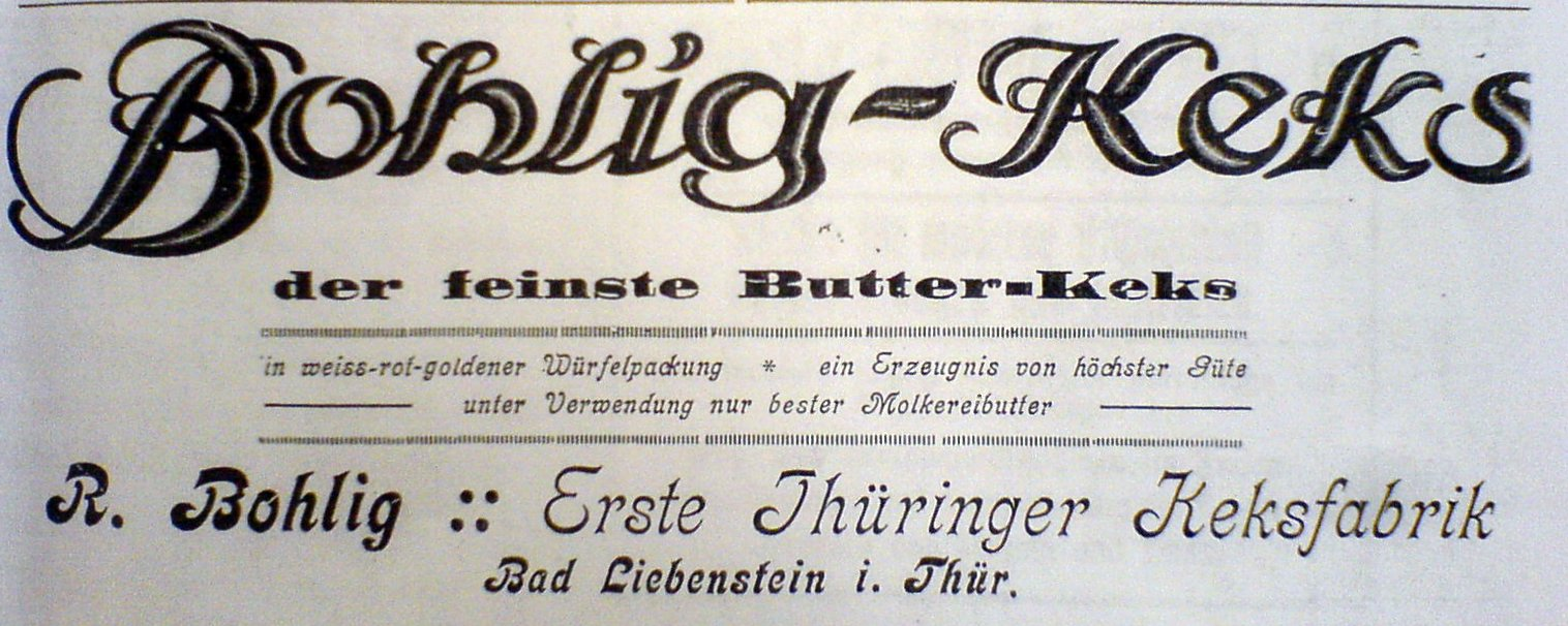 Werbeanzeige der Ersten Thüringer Keksfabrik aus den 1920er Jahren.